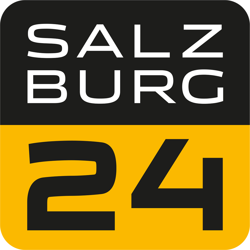 SALZBURG24 Logo